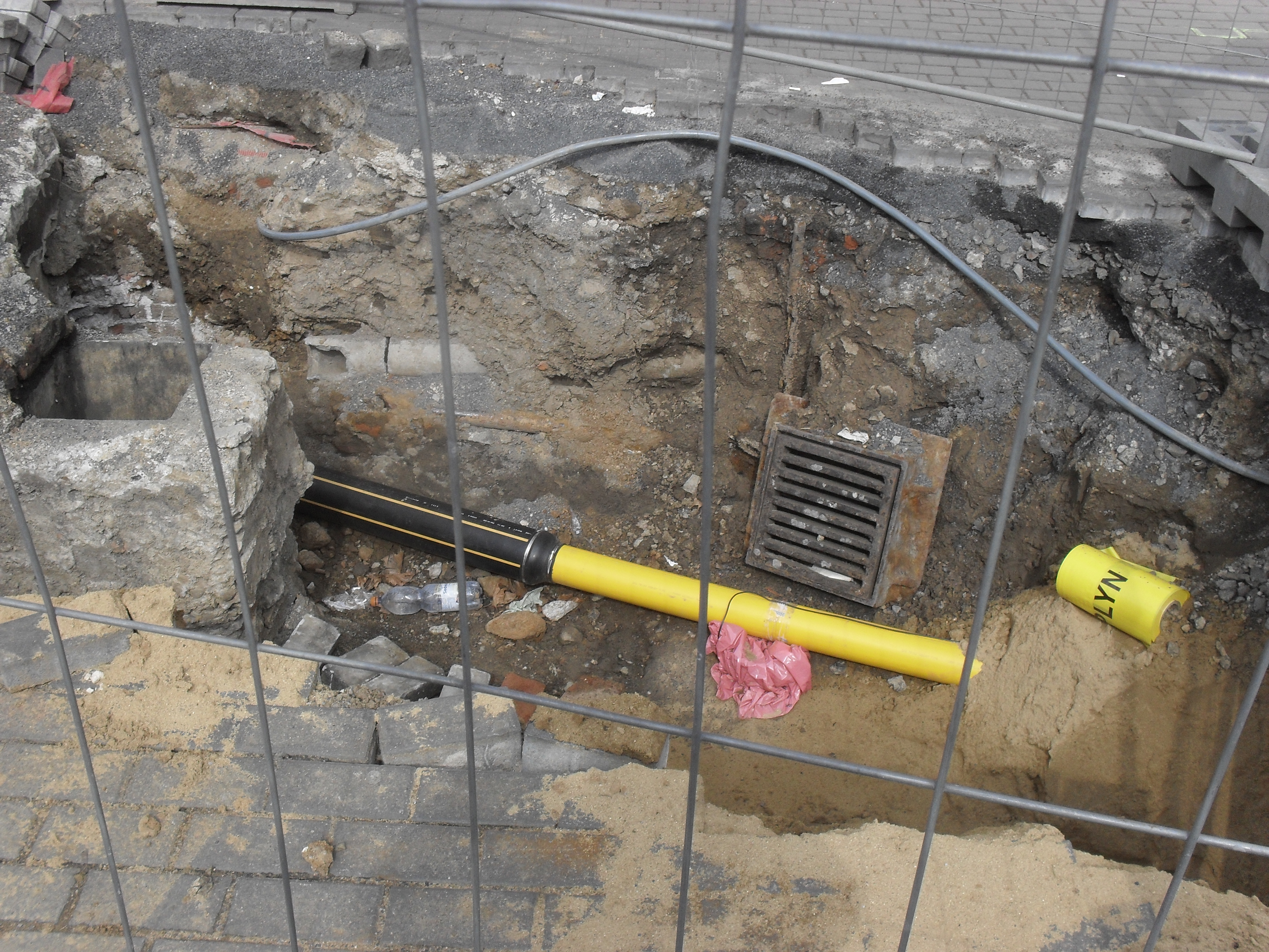 Magistrát města Ústí nad Labem